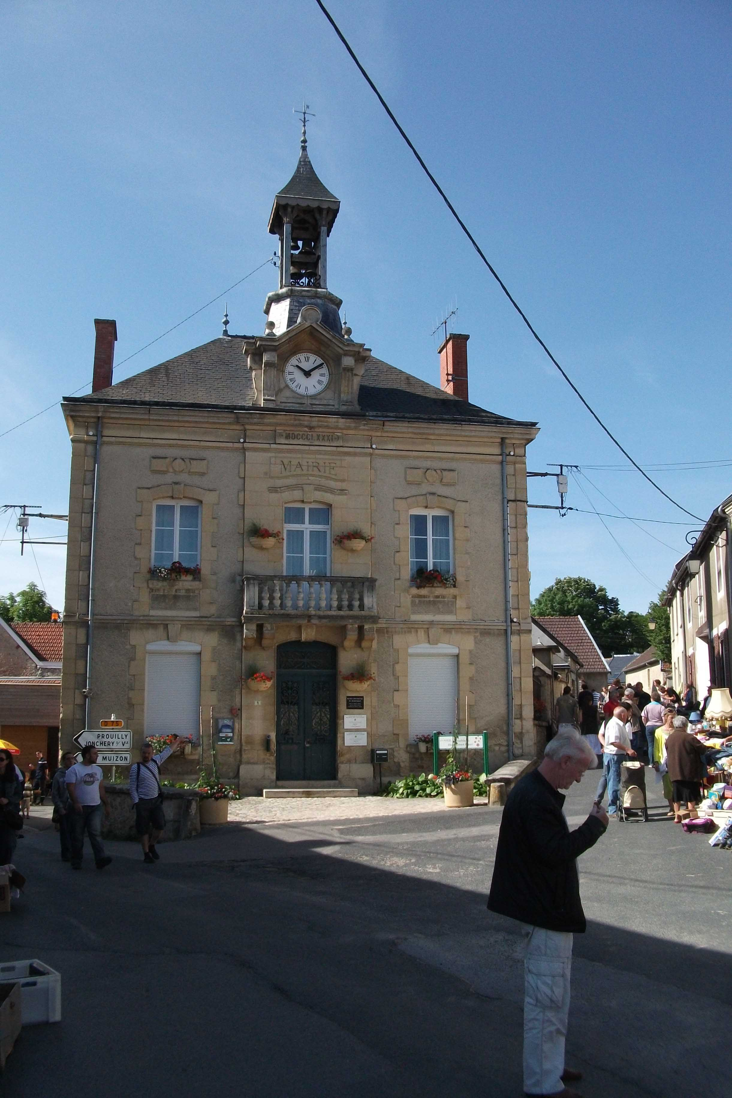 Vue de la mairie de Trigny avec le local des pompiers accolé à gauche.